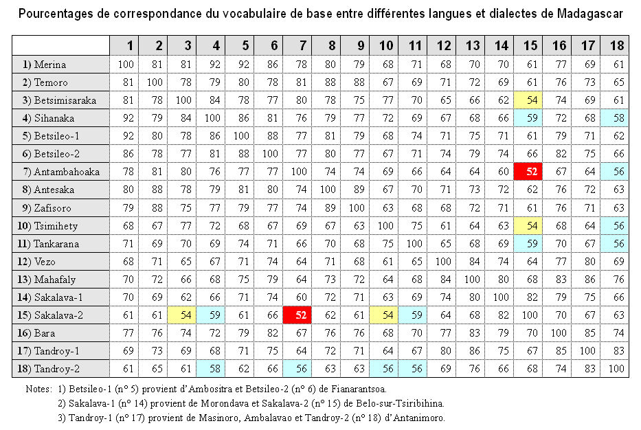 Tableau des différences entre le vocabulaire de base des différentes langues et dialectes de Madagascar. Tableau didactique. Libre de tout droit.